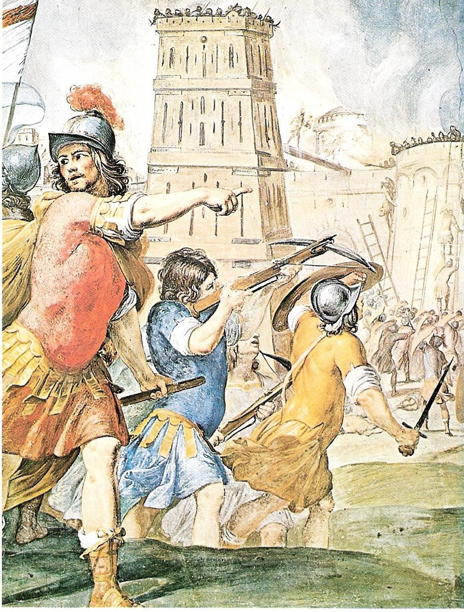 Raffigurazione di Guglielmo Embriaco alla conquista di Gerusalemme nel 1099. Dipinto del pittore Giovanni Battista Carlone (XVII secolo) presso Palazzo Ducale di Genova